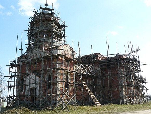 Зембин, церковь св. Михаила Архангела (1904 г.). Фото путешествия по Беларуси.